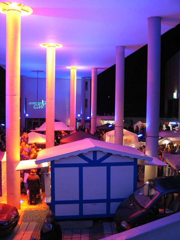 Germany Bergkamen Event "Lichterfest 2004"